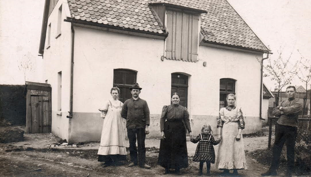 Fritz Linde (rechts) mit Familienmitgliedern. Das Haus ist heute das Fitz Linde Museum.